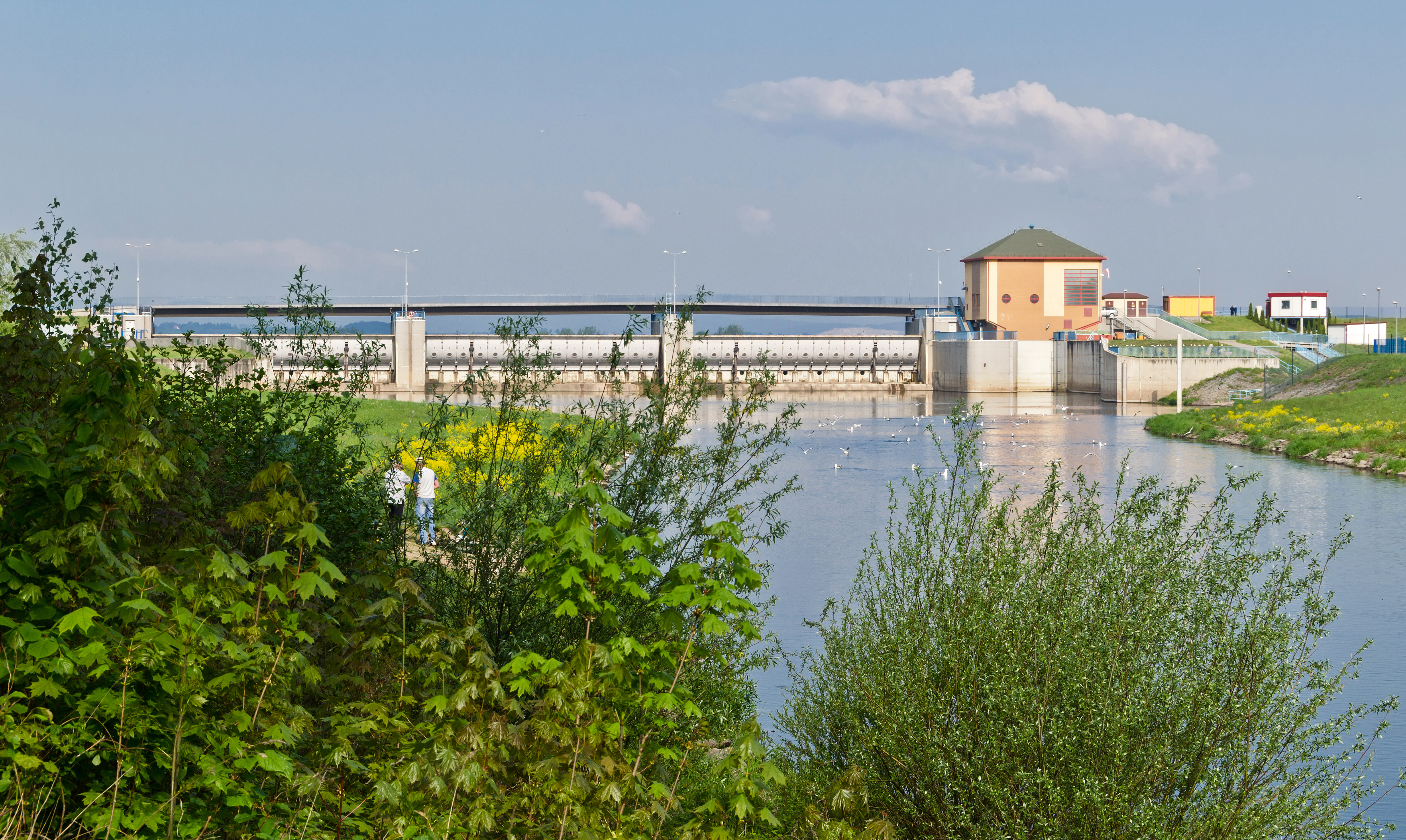 Zapora na Jeziorze Paczkowskim, w Kozielnie